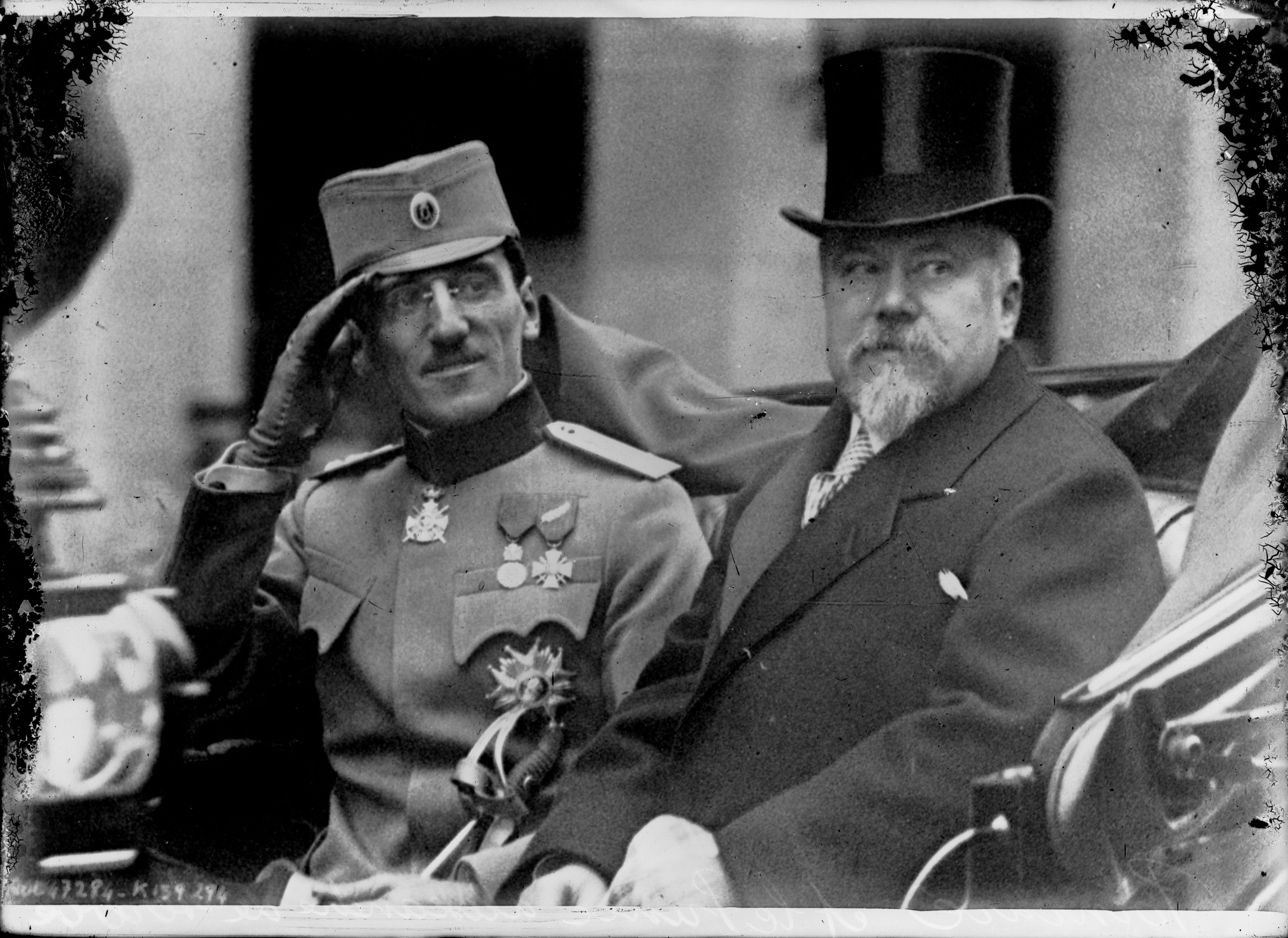 El regente serbio Alejandro y el presidente francñes Raymond Poincaré.